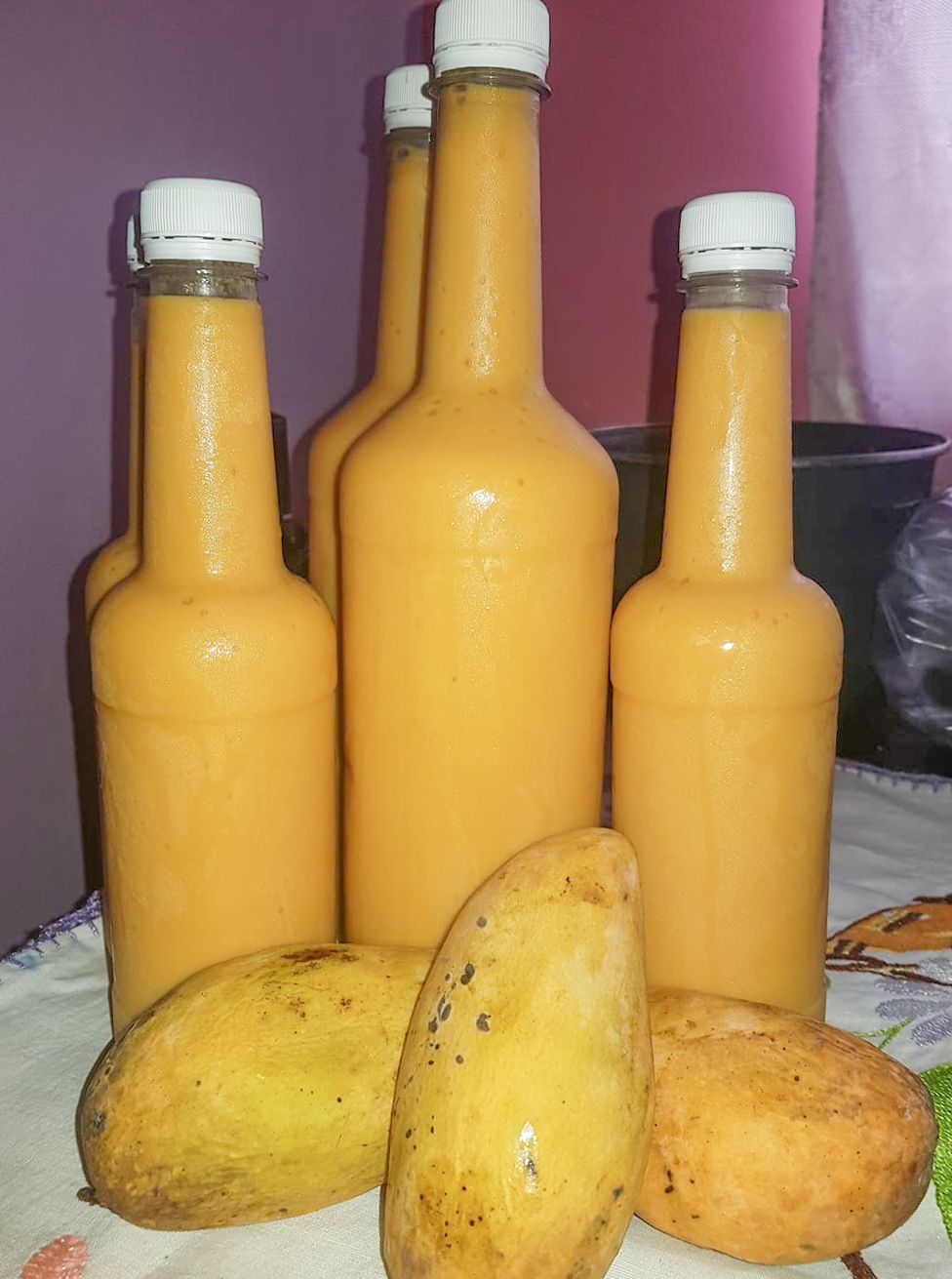 Torito veracruzano casero con mango